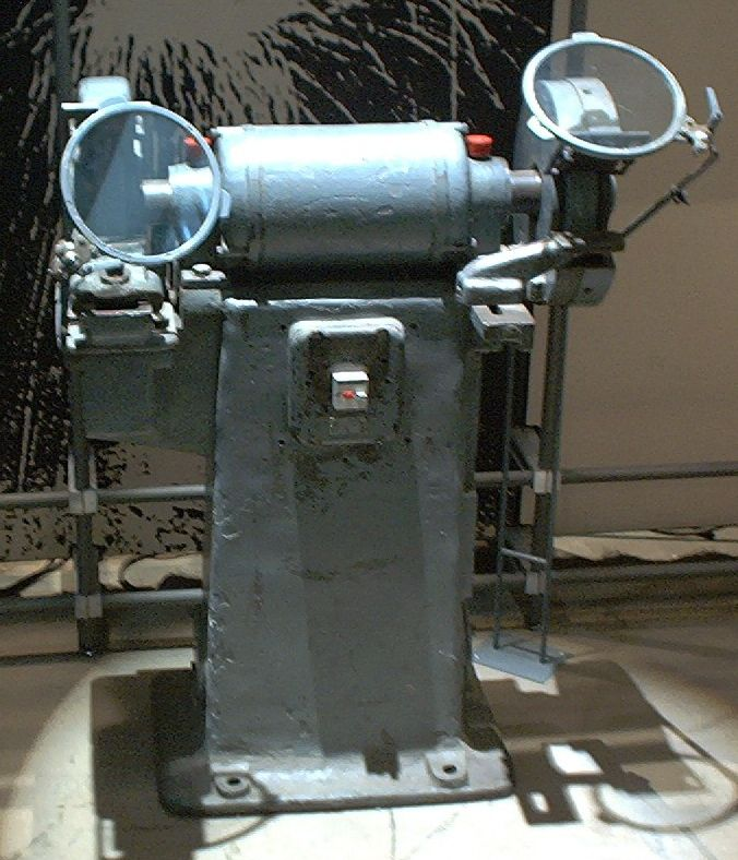 Zweischeiben-Schleifmaschine